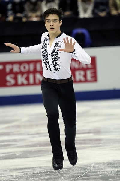 Макар Игнатов (Россия) на финале юниорского Гран-при 2017-2018